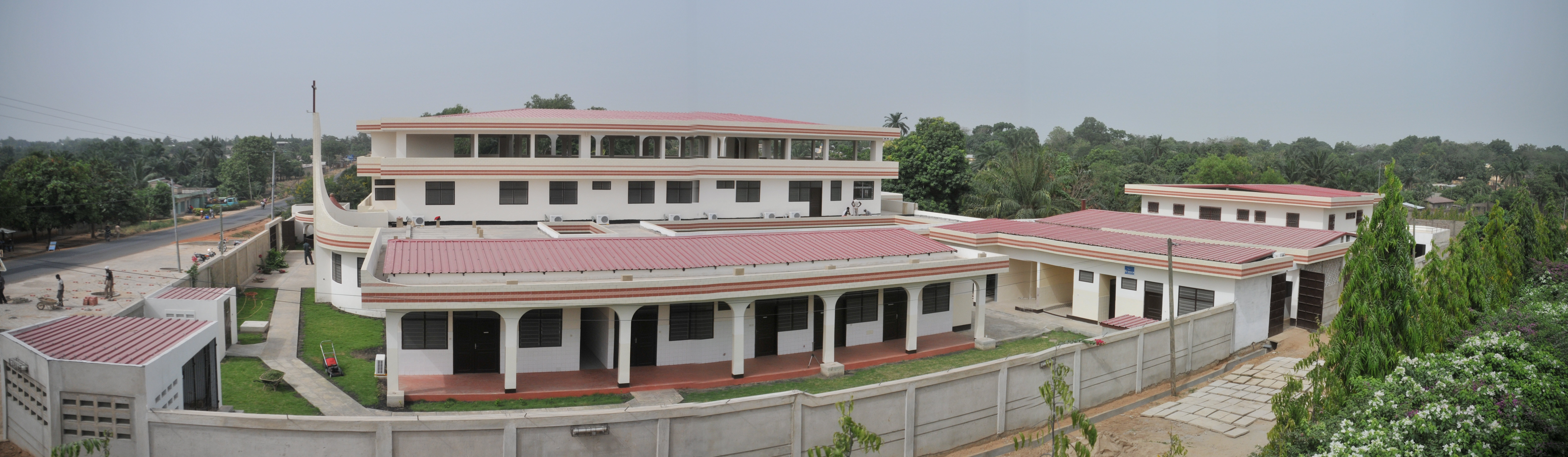 Centre médical de Sokodé. Communauté du Puits de Jacob.